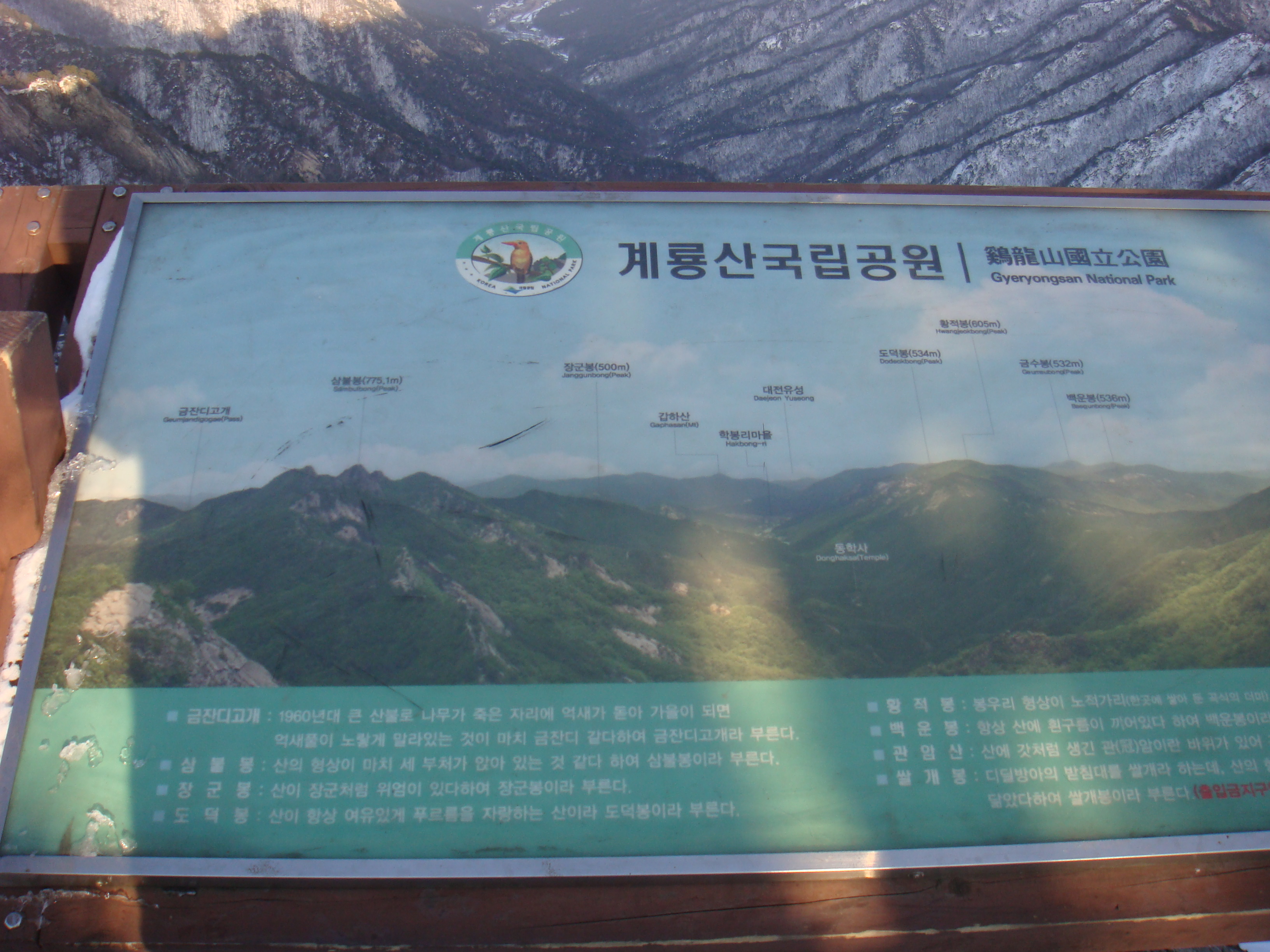 a map of Gyeryongsan